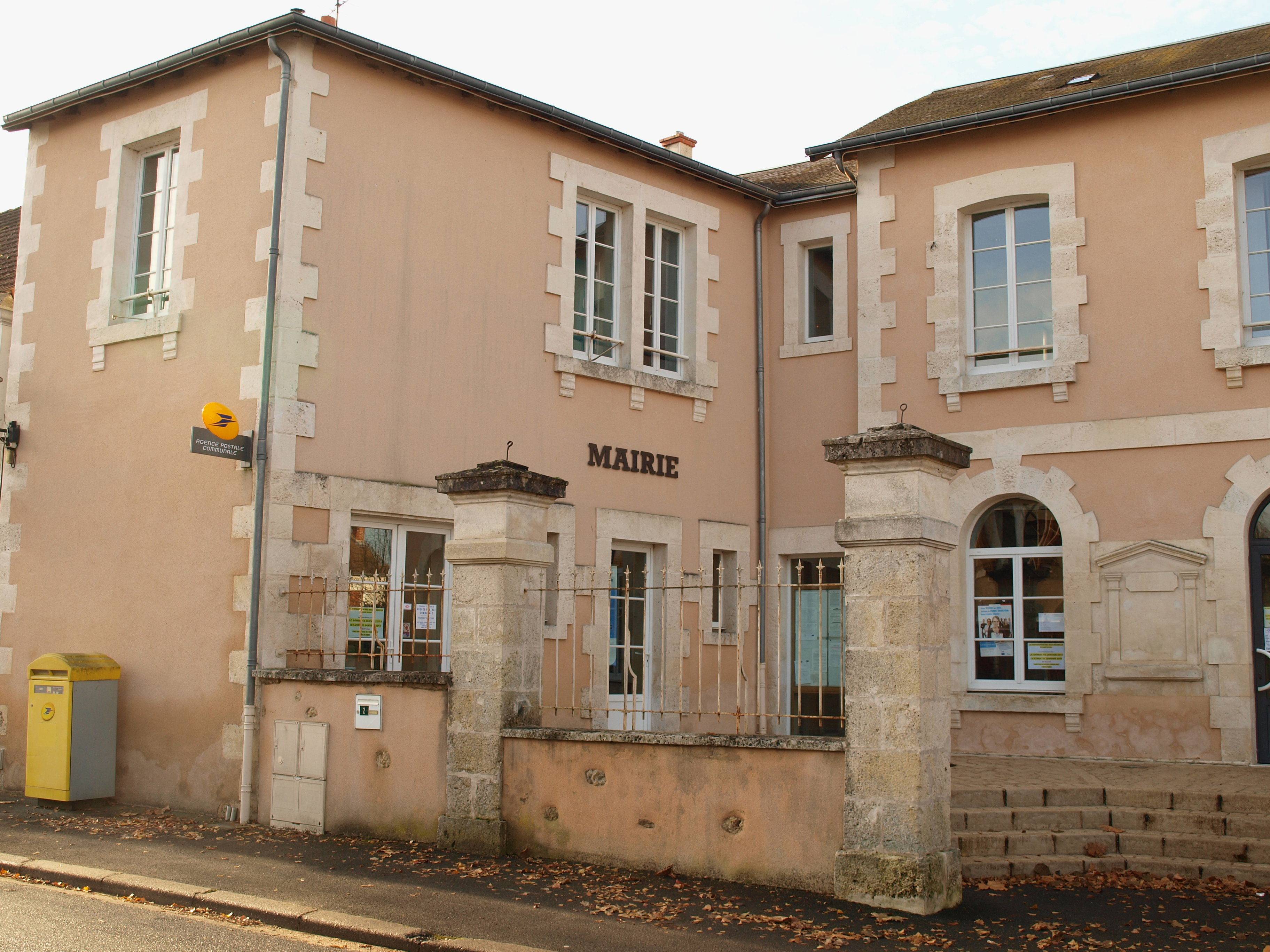 Luant (Indre, France) ; mairie